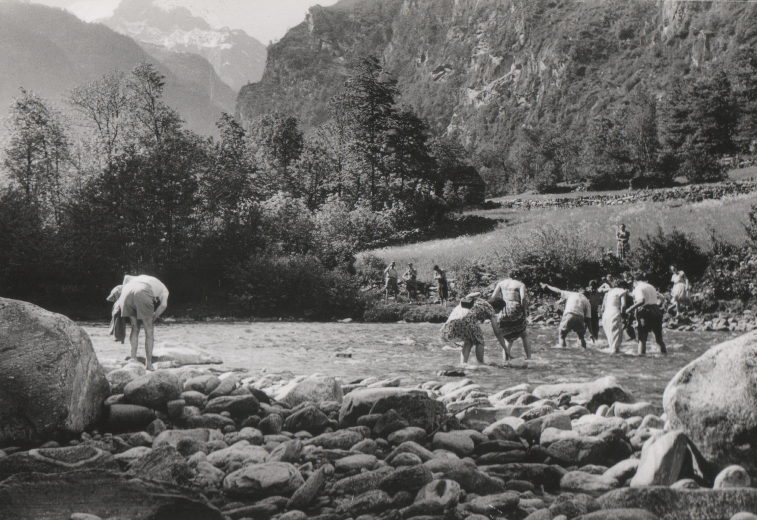 Bildunterschrift: Ausflug zum Lago Maggiore: Die „Pionier-Tat“ - Ziel, CVJM = Christl. Verein junger Menschen (zu der Zeit noch Christlicher Verein junger Männer). - 1. CVJM-Freizeit für junge Damen und Herren in ganz Deutschland - Ascona, Locarno Mai 1954. An einem vorhergehenden Foto: 1953 nahm der CVJM / Sterntor als erster in Dtschld. weibliche Mitglieder mit vollen Rechten auf. Es hagelte Proteste aus den CVJM Deutschlands!: „Heiratsbüro“.